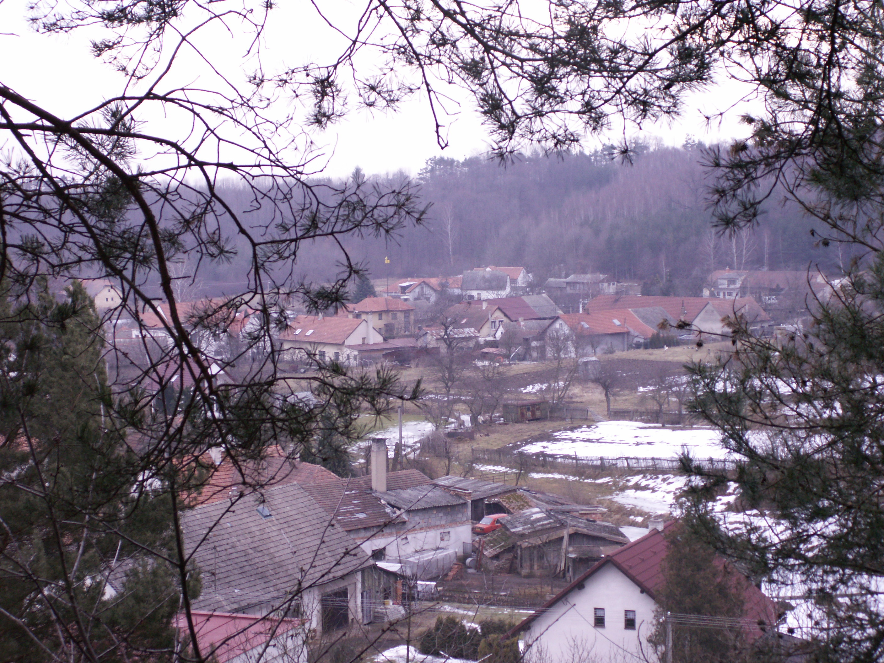 Brloh, okres Pardubice, pohled na obec od bývalého lomu